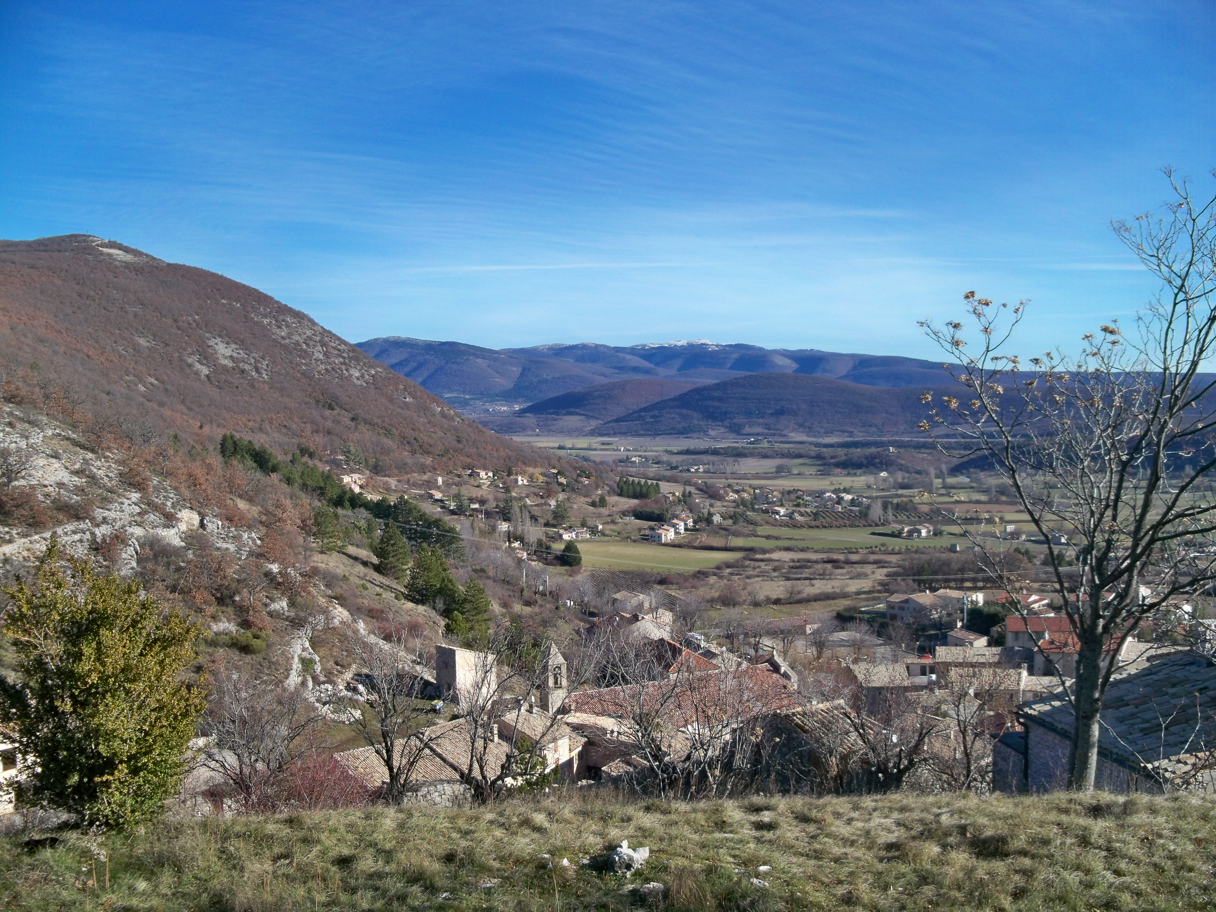 vue sur le paysage autour de Banon (04), France